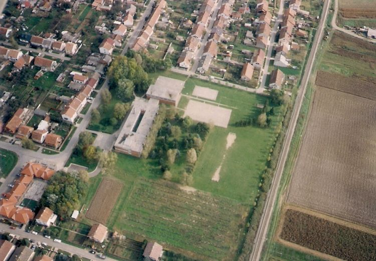 Panoramski pogled na Višnjevac, kraj Osijeka. Osnovna škola u prvom planu. Ožujak 1999.